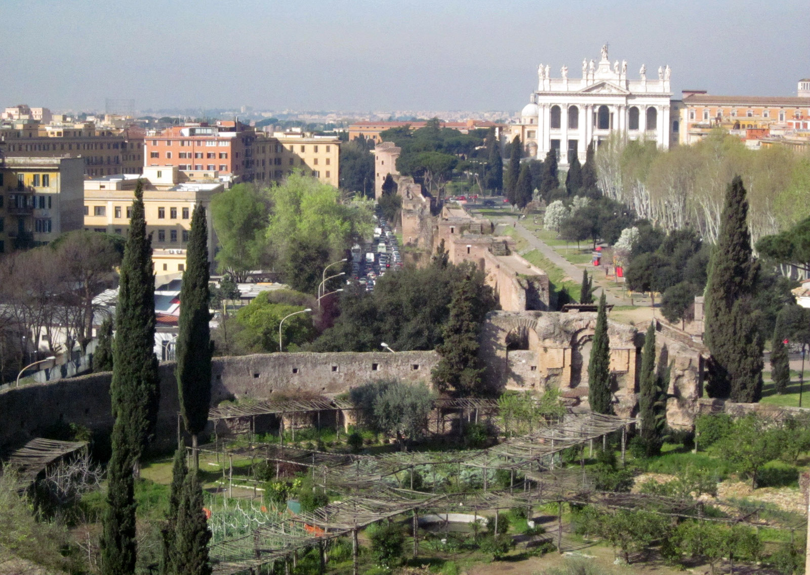 Rome, Domus Sessoriana, uitzicht op Anfiteatro Castrense en San Giovanni in Laterano.